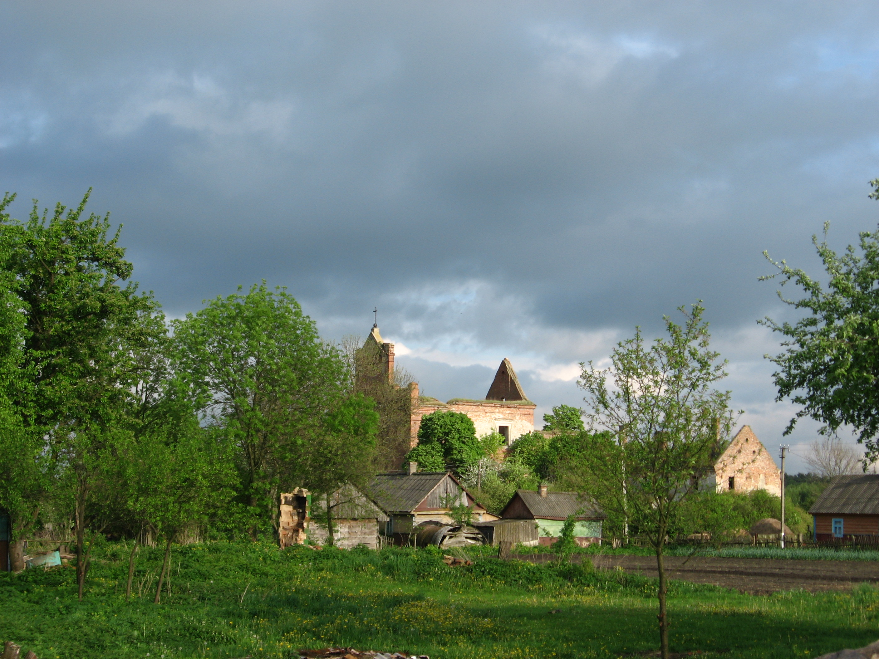 Кисилин. Вид на костел